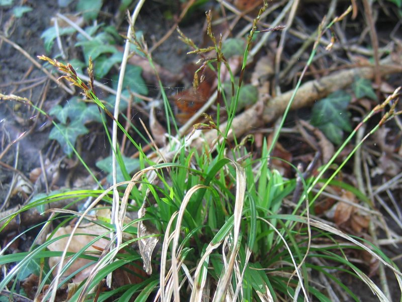 Habitus der Finger-Segge Carex digitata, Rügen